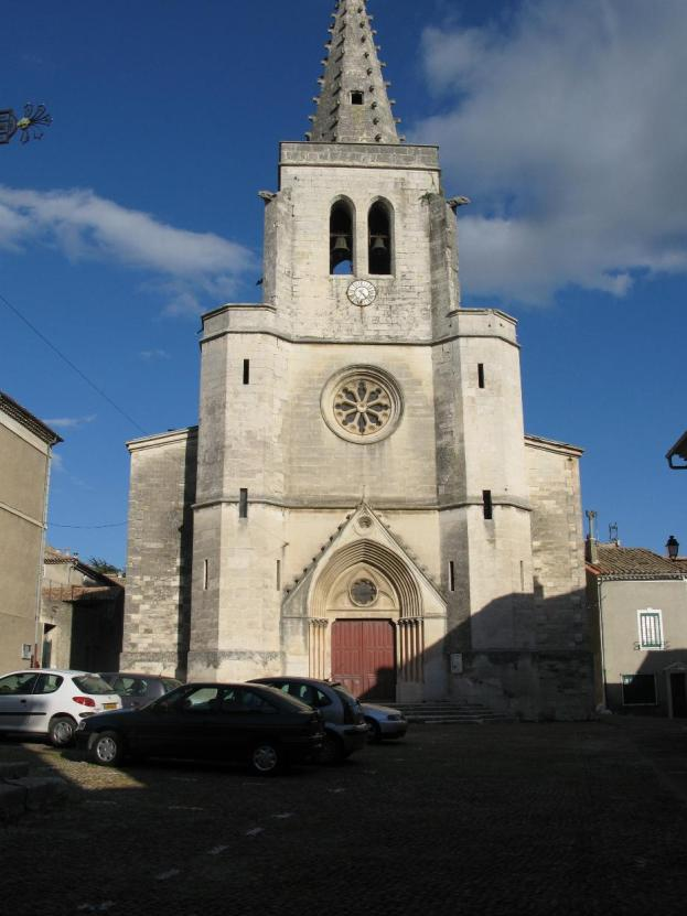 Village de Saint-Marcel d'Ardèche (Ardèche)